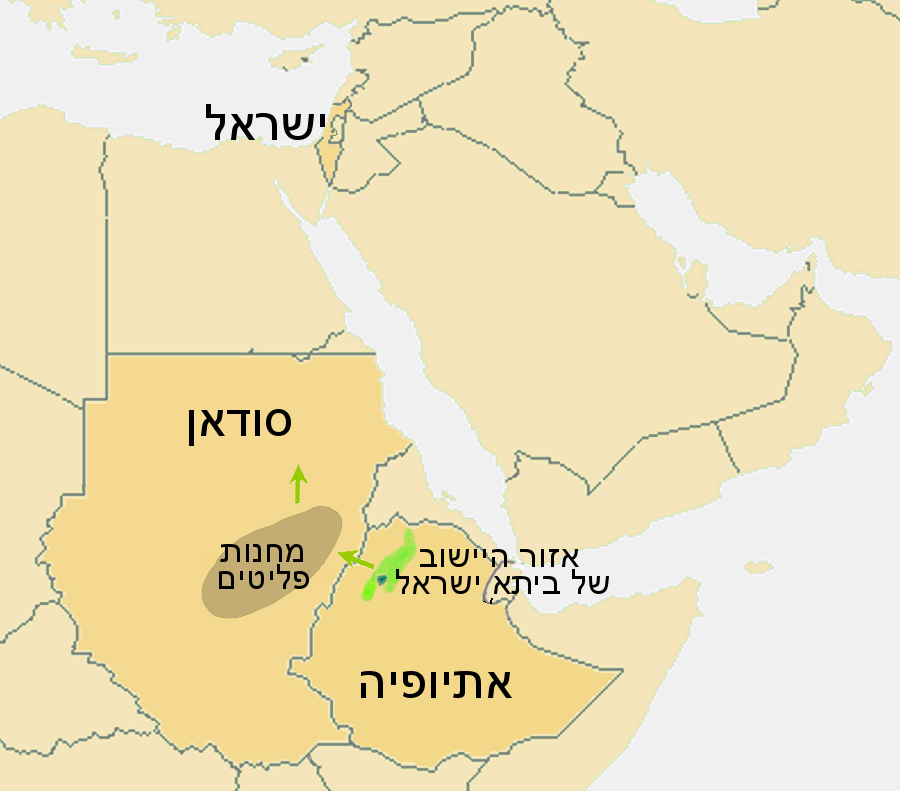 Falasha migratio